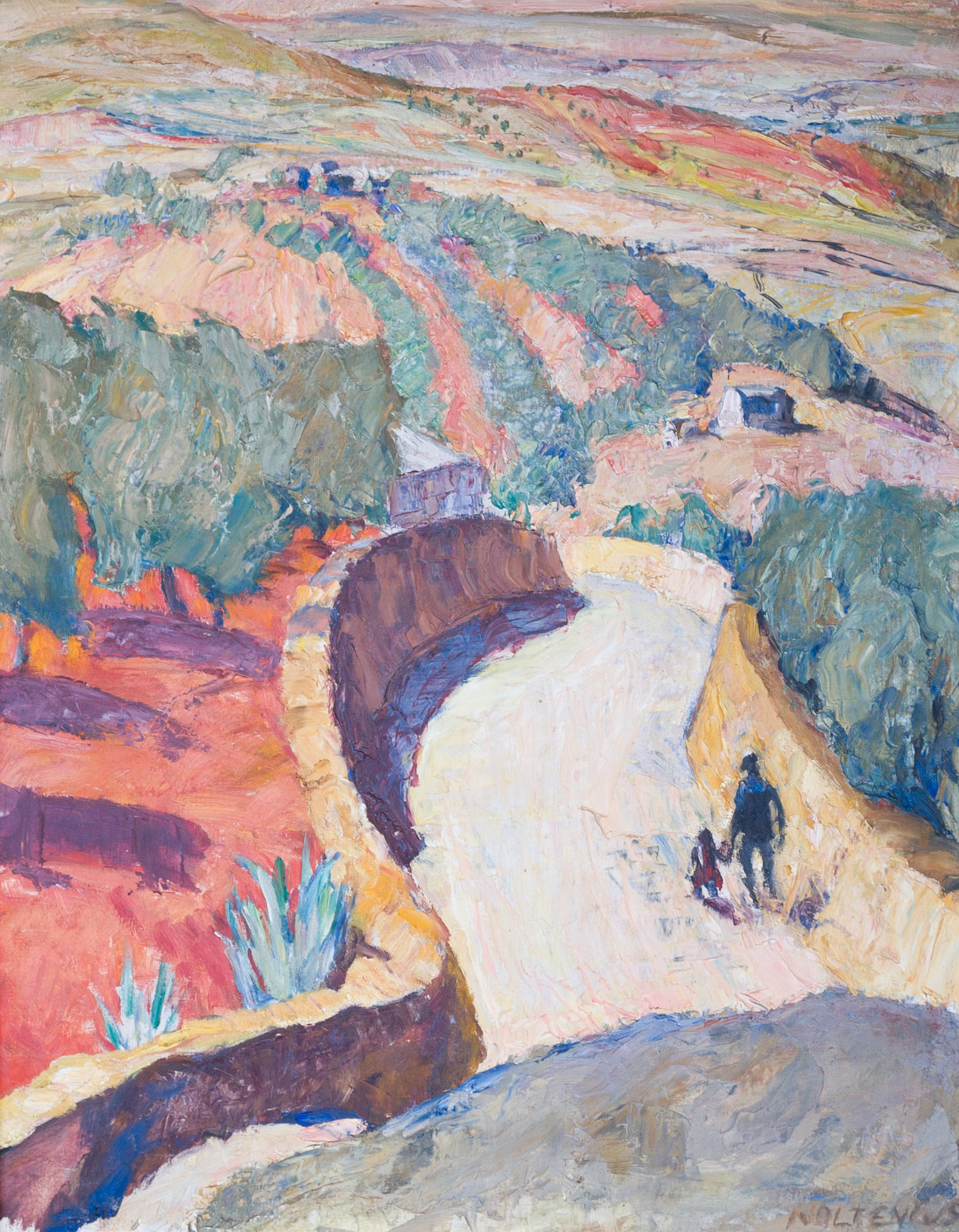 "Spanische Landschaft" Öl 1927, Privatbesitz, Foto: Victor Ströver